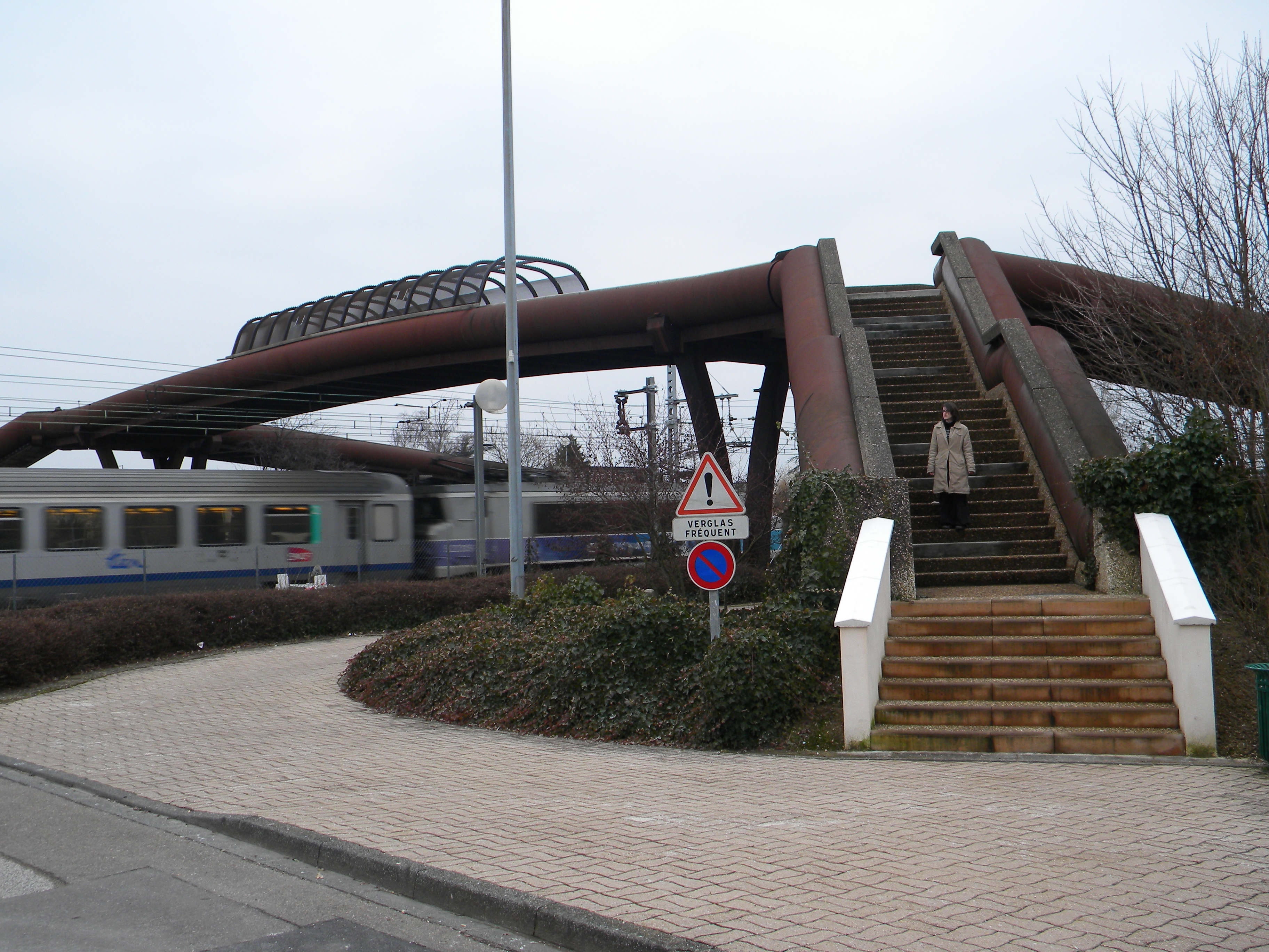 fera ponto (1985) rue du stand